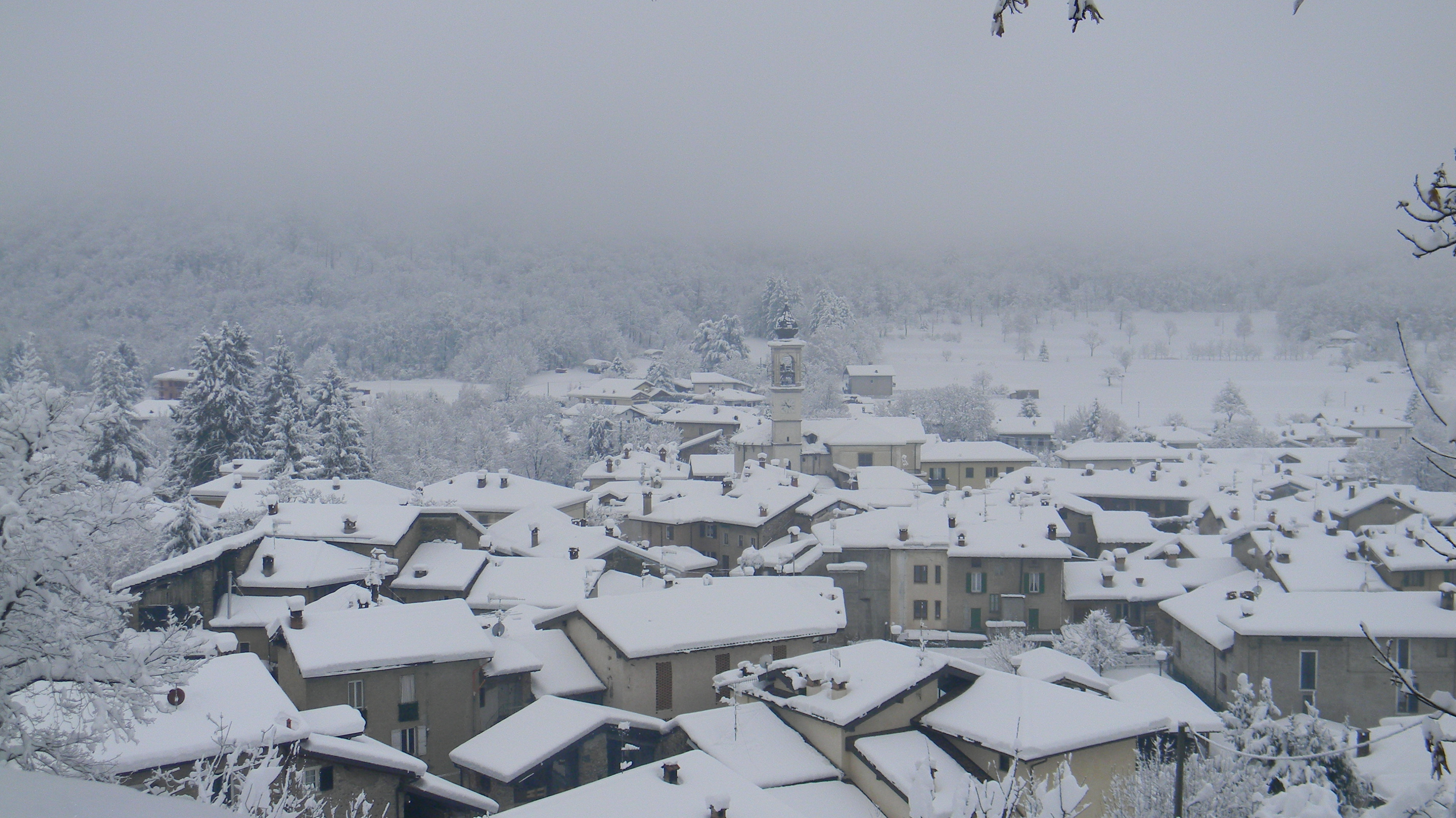 Panorama del centro abitato di Brinzio dopo una fitta nevicata